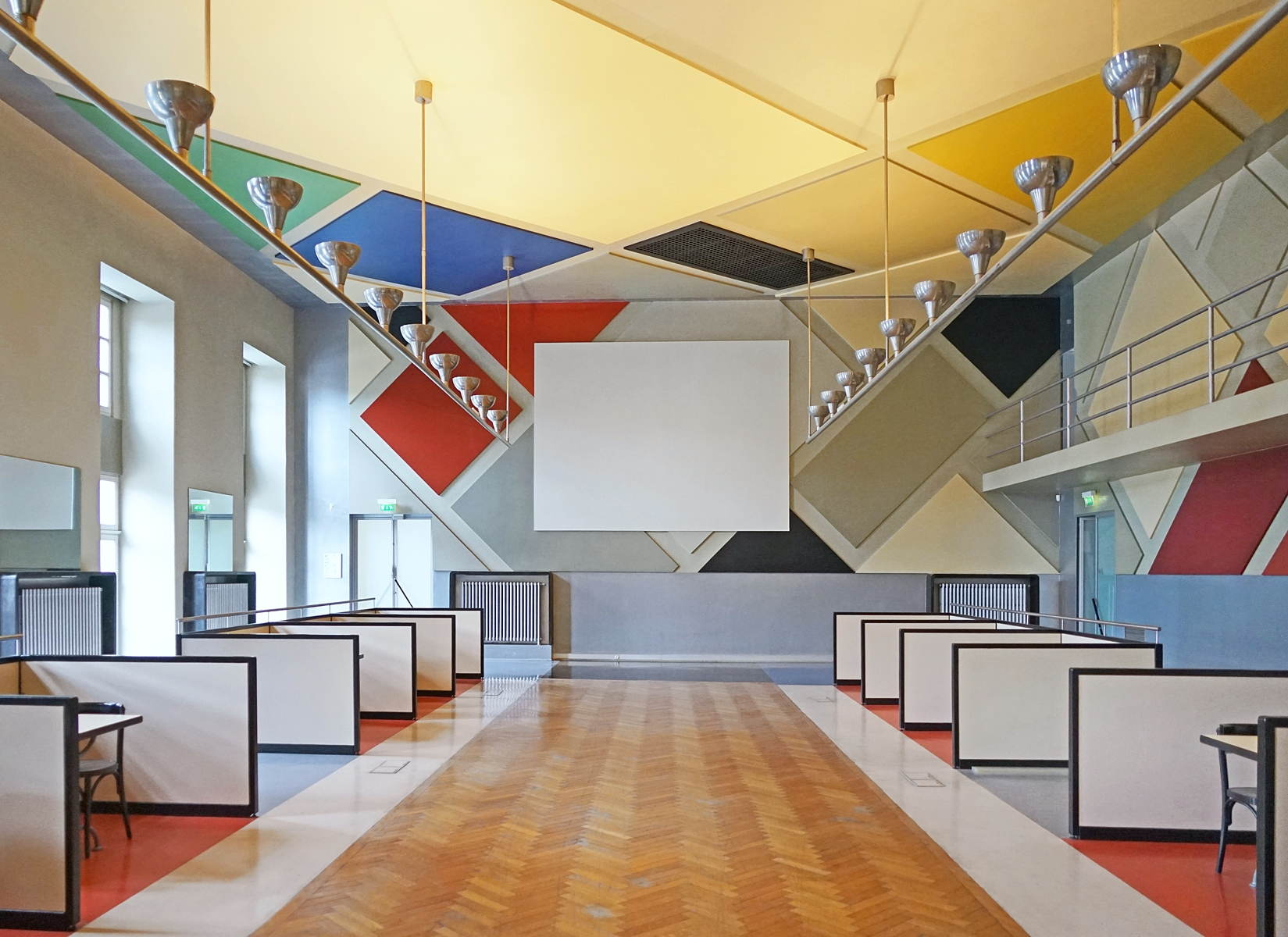 Restitution in situ à Strasbourg du ciné-dancing (ciné-bal) du complexe de loisirs de l'Aubette, conçu entre 1926 et 1928 par Théo Van Doesburg En 1926, les frères Horn confient l'aménagement intérieur de l'Aubette (une halle de danse) à Sophie Taeuber-Arp. A cette commande volumineuse, elle associe Jean Arp et Theo van Doesburg. Les 3 artistes se sont répartis le travail de décoration des espaces appartenant aux quatre niveaux occupés par l'Aubette, dans l'aile d'une ancienne caserne située place Kléber, en plein coeur de Strasbourg. Les salles ont été réaménagées dix ans plus tard et les décors d'origine ont été partiellement détruits. Les décors de 1928 de quatre salles du premier étage et de l'escalier ont été restitués, avec l'aide d'un comité scientifique international, par les musées de la ville de Strasbourg en raison de l'importance de ces réalisations pour l'histoire de l'art moderne.